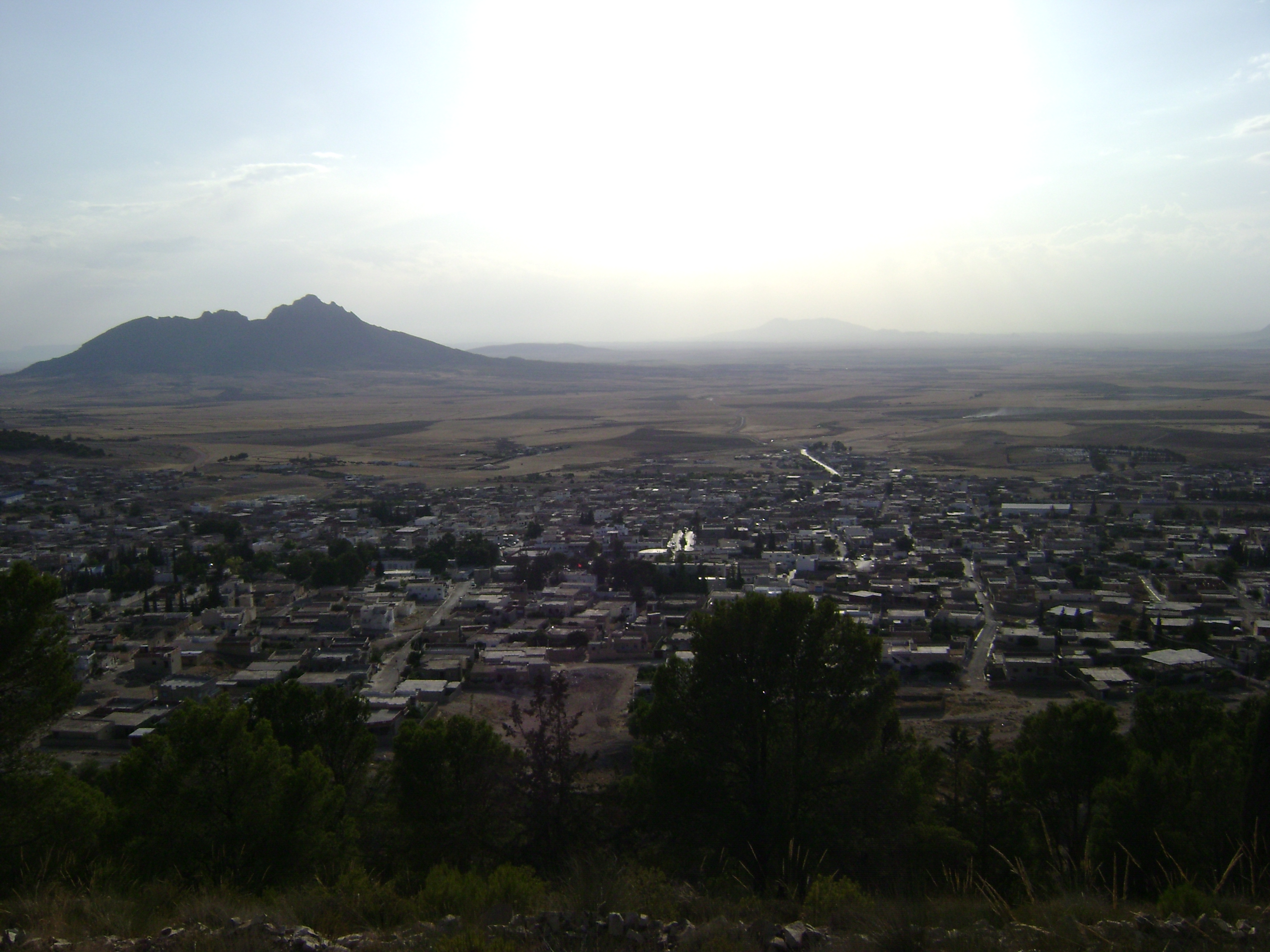 Vue génerale de Tajerouine